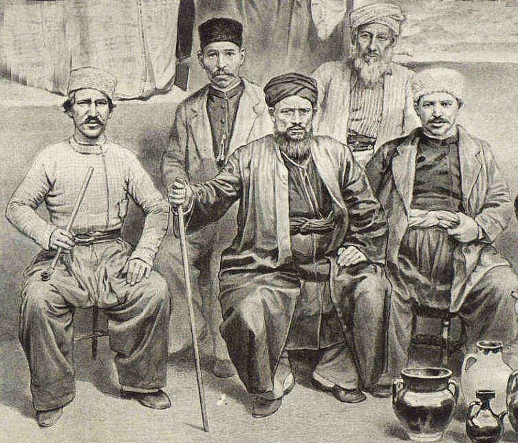 Этнографический обзор - Россия второй половины XIX века; Степные крымские татары.